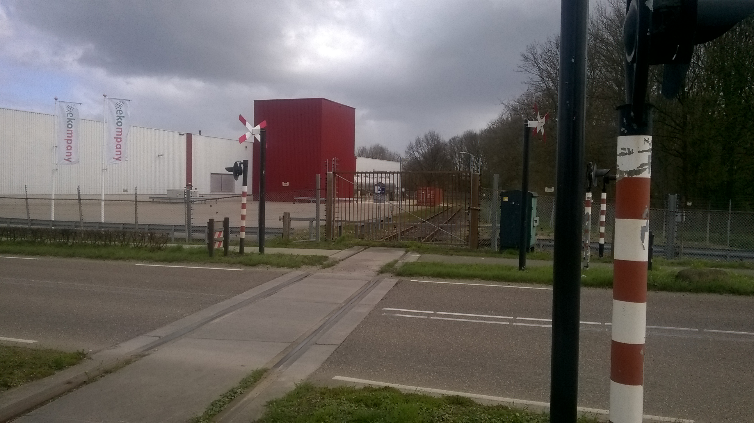 Aansluiting van autobedrijf Koopmans op de spoorlijn Sittard - Born. Foto genomen van de Verloren van Themaatweg in oostelijke richting.